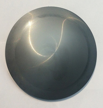 Фотография линзы инфакрасной линзы купленной на Amazon